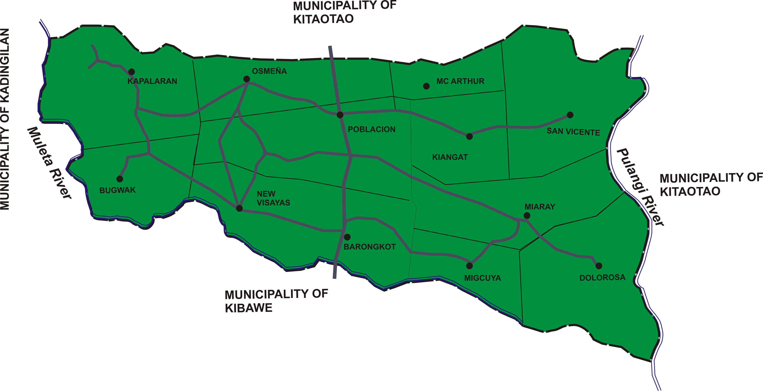 Political map of Dangcagan, Bukidnon